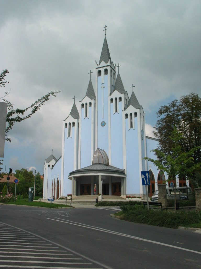 A church in Hévíz, Hungary. Szentlélek római katolikus templom, Hévíz